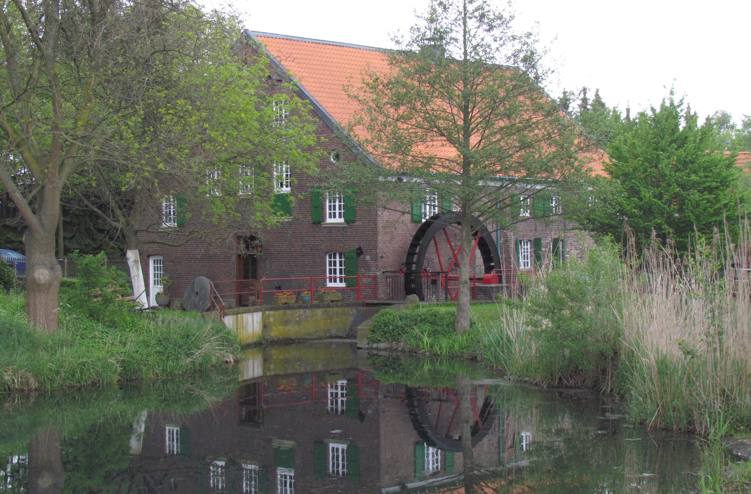 Schmuckstück Bongartzmühle